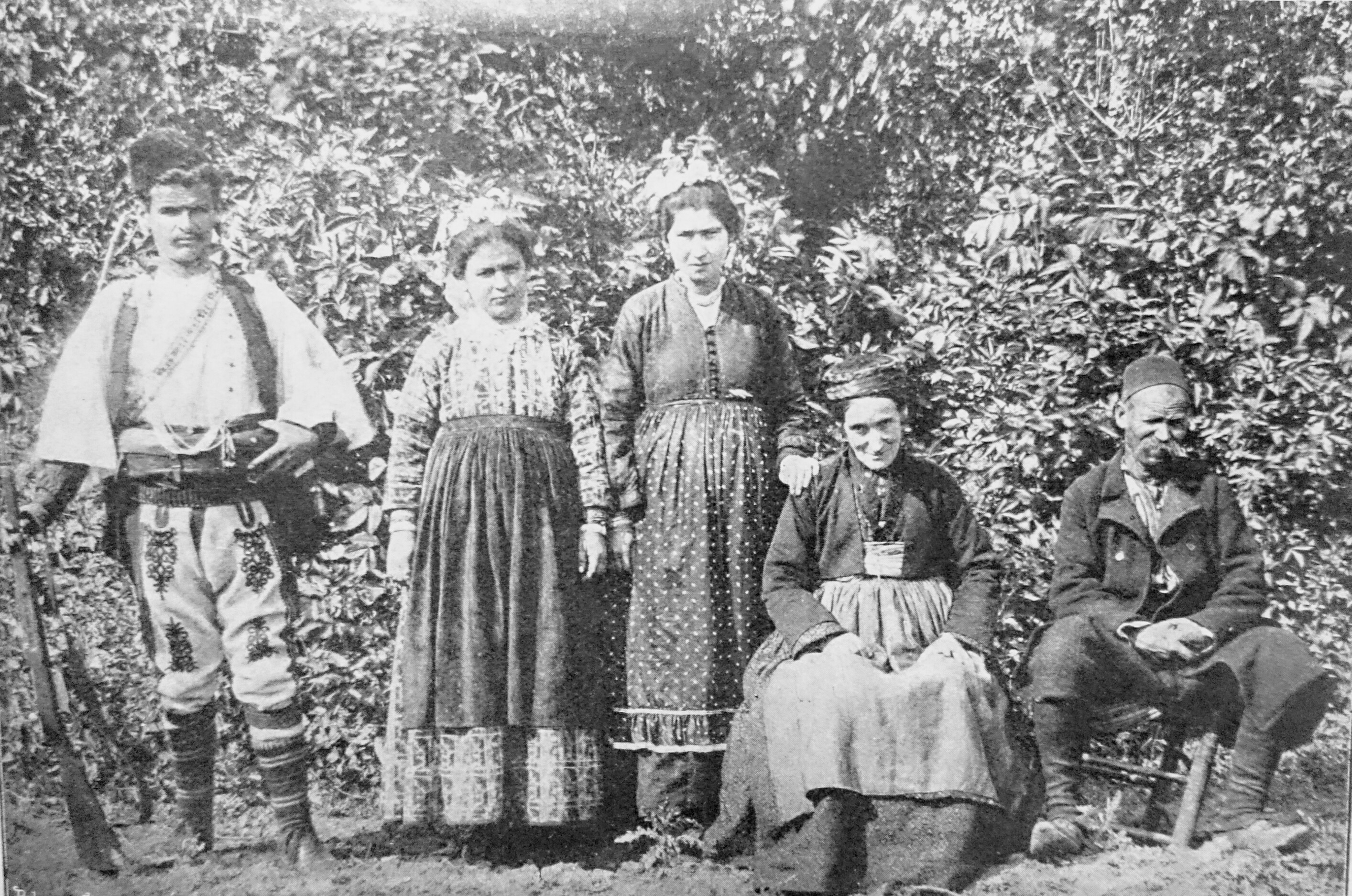 Typy makedonských Bulharů z okolí Soluně